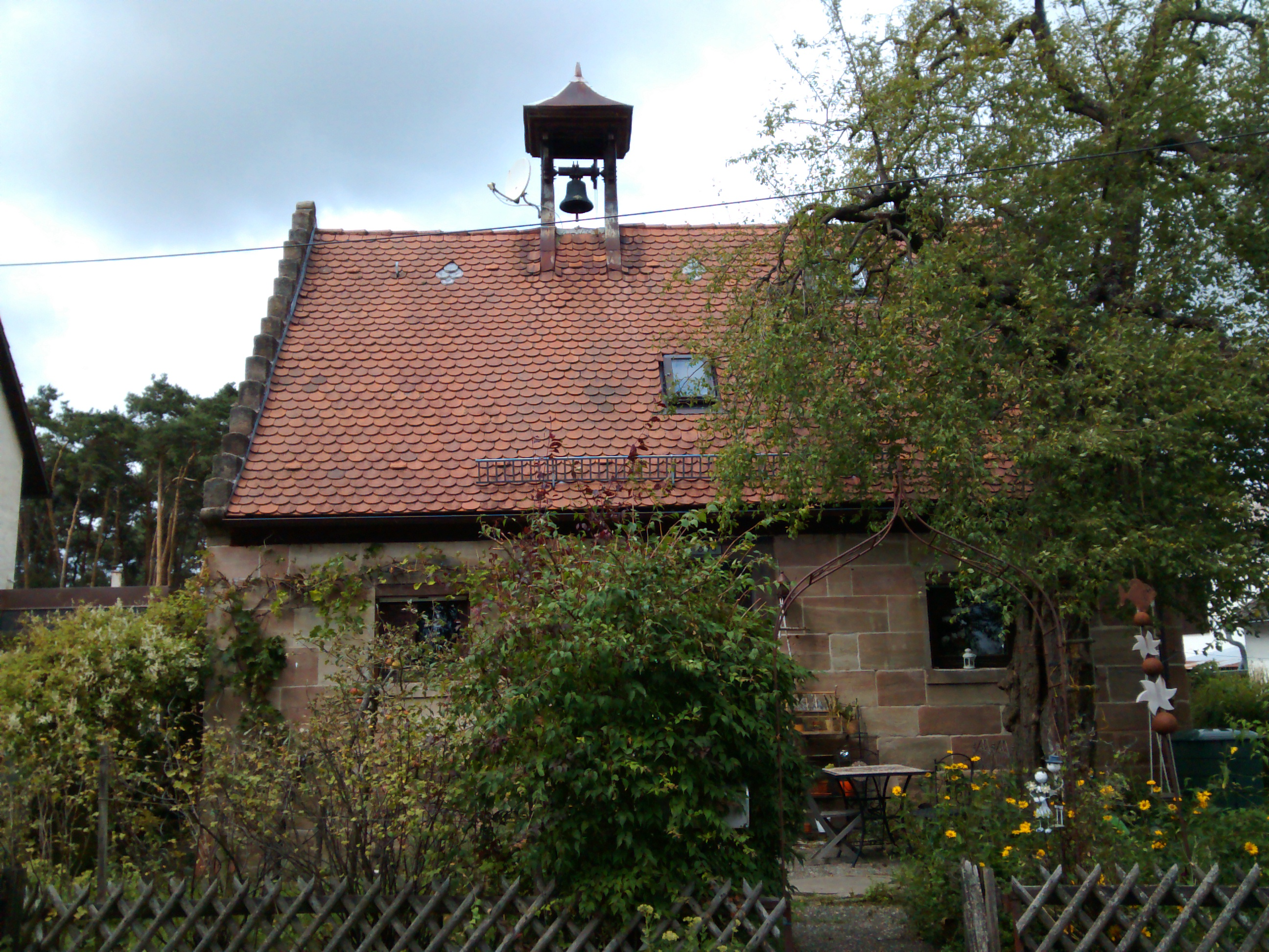 ehem. Gemeindehaus in Weiher